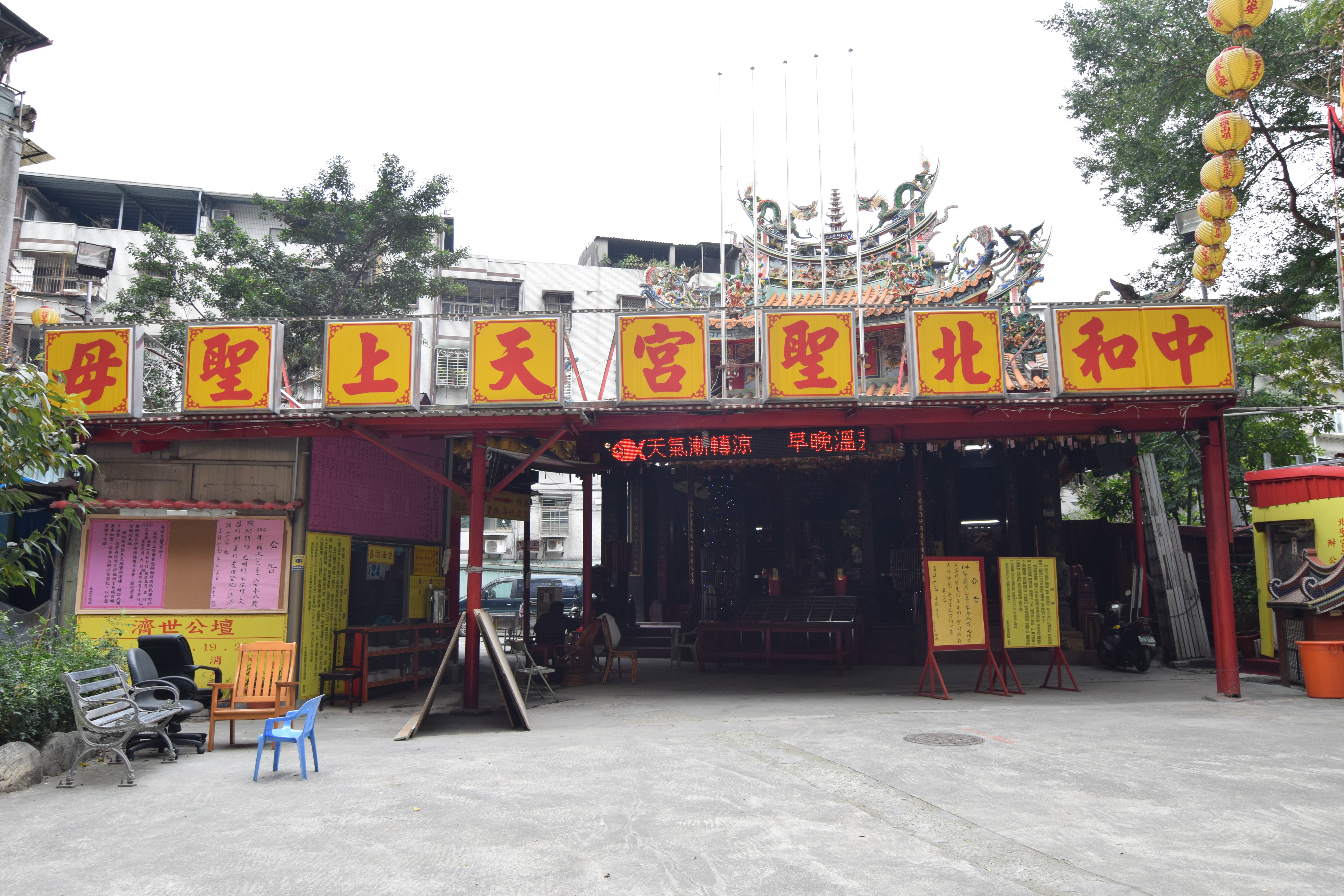 北聖宮廟體正面相片